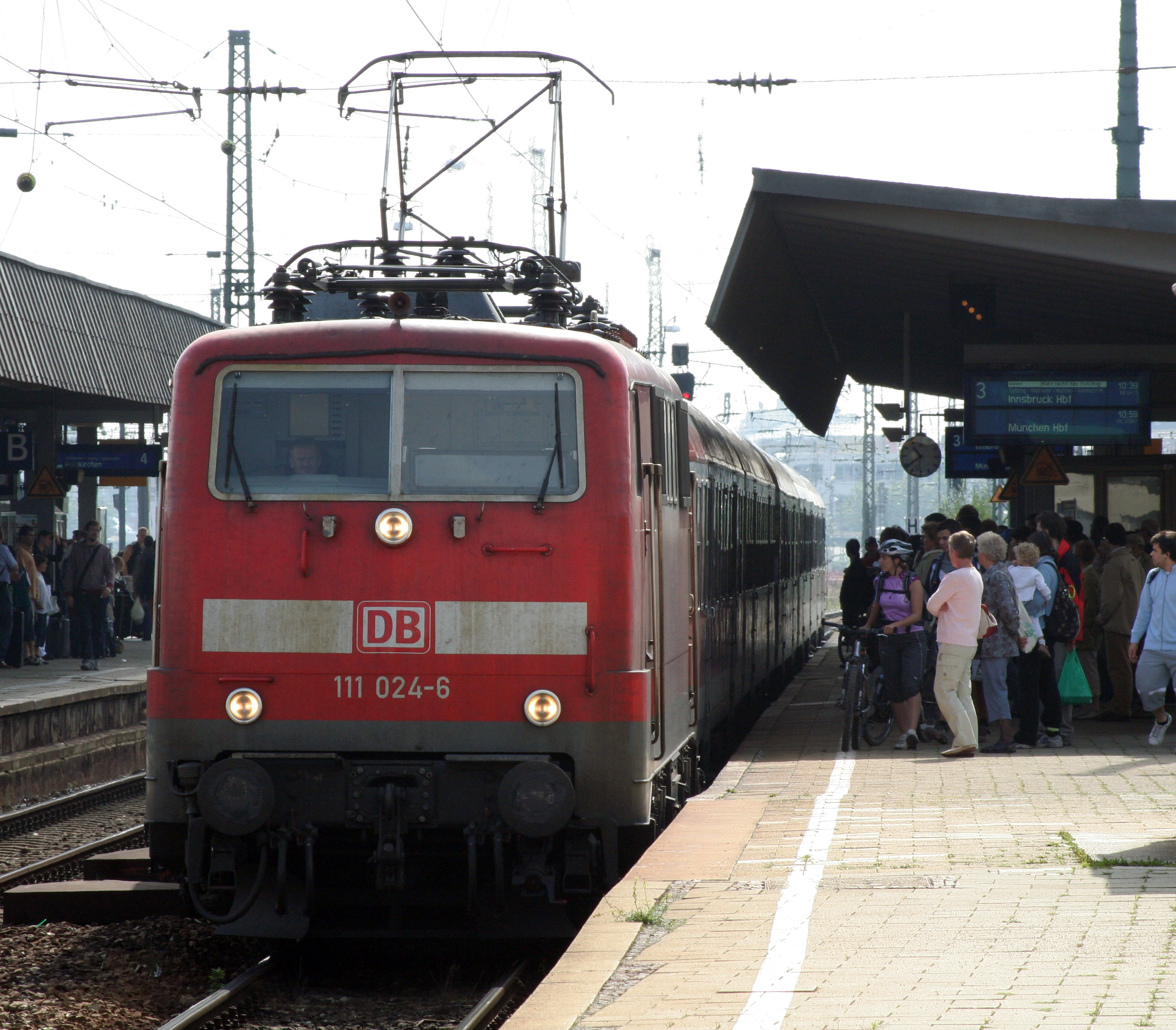 DB 111 024-6 te Munchen Pasing